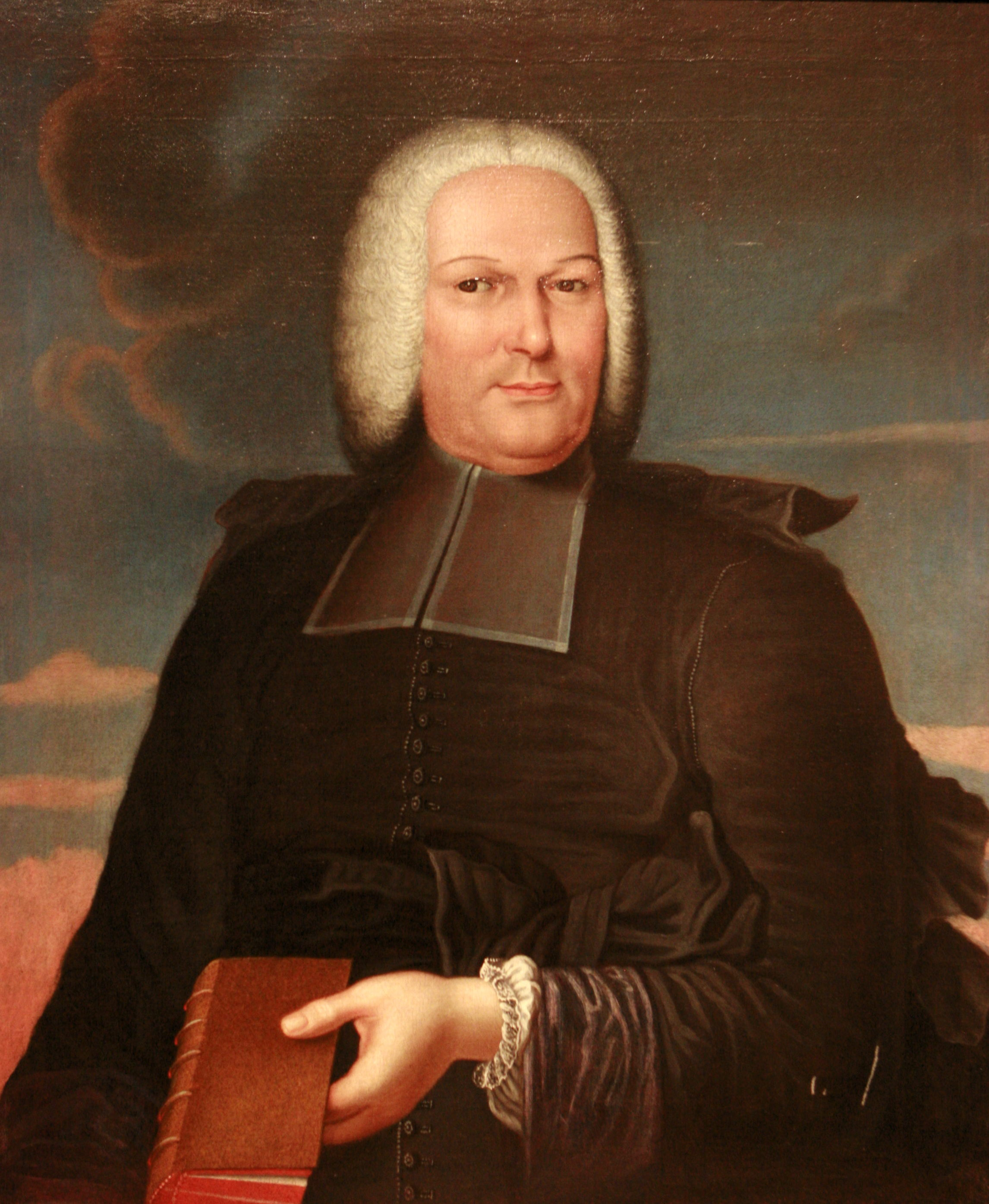 Portrait of François Cohalan (1677-1760)